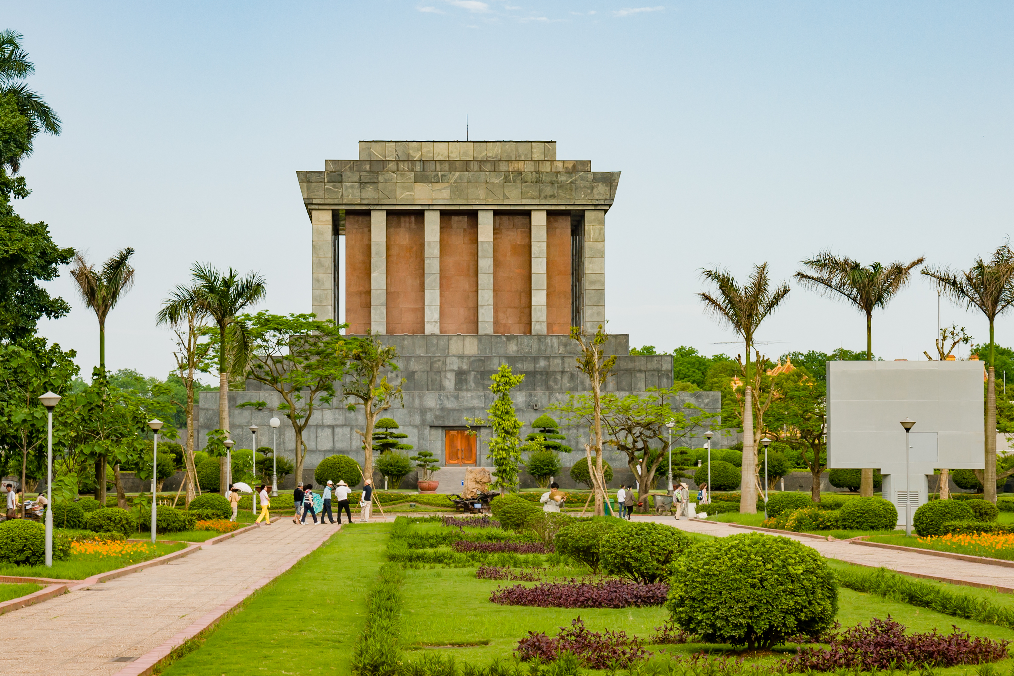 Hanoi, Vietnam: Mausoleum of Ho Chi Minh. View from park side.